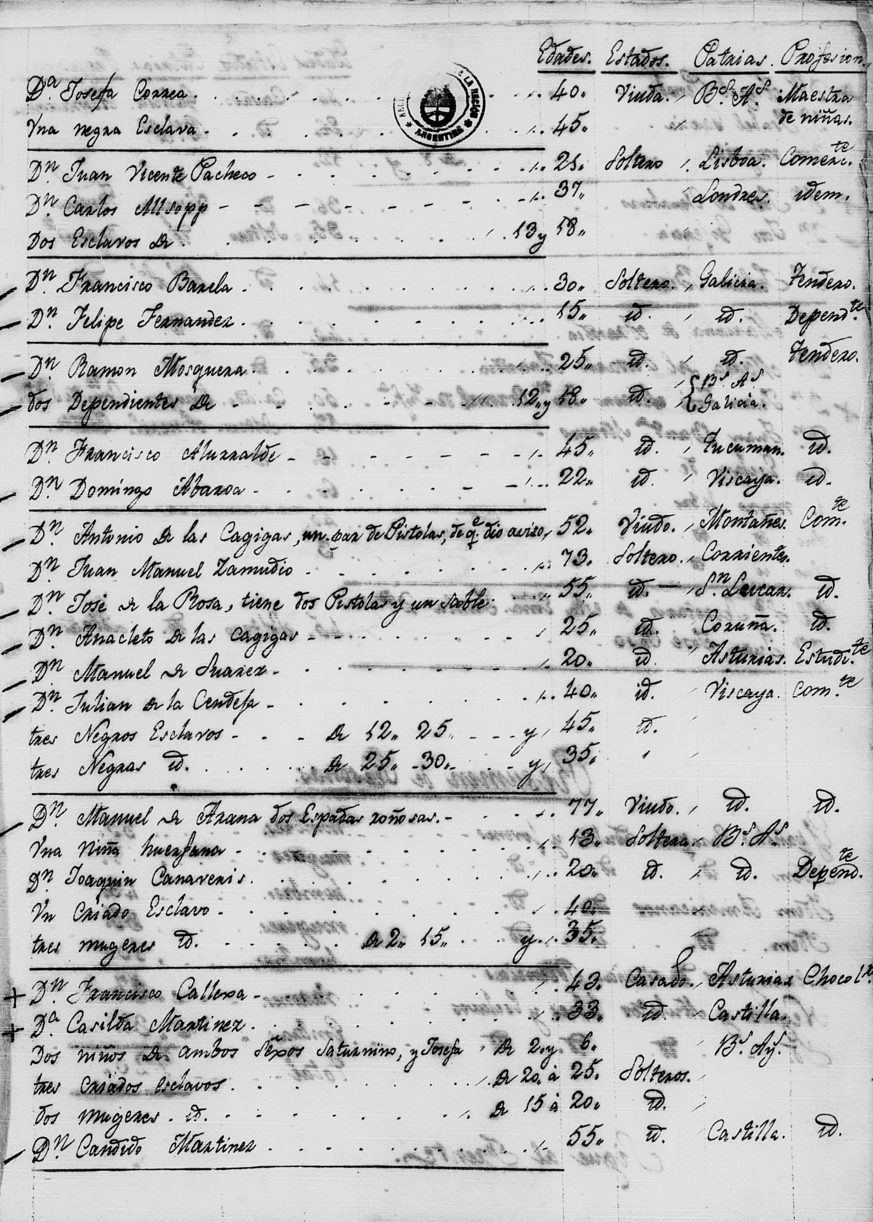 Padrón de habitantes de la Ciudad de Buenos Aires de 1810 (Manuel de Arana y Joaquín Canaveris).